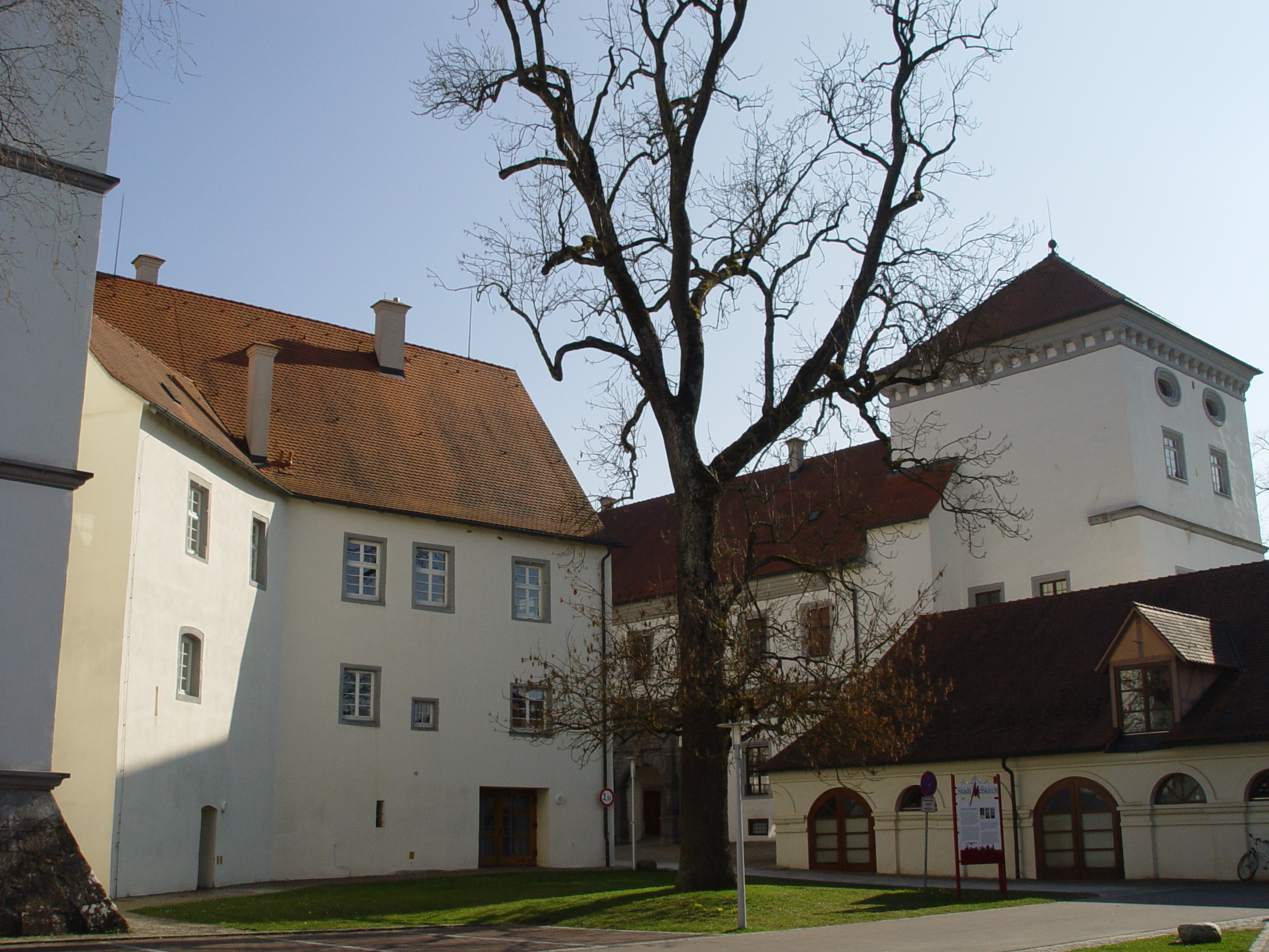 Schloss Meßkirch mit "Schlössle" links und Remise rechts